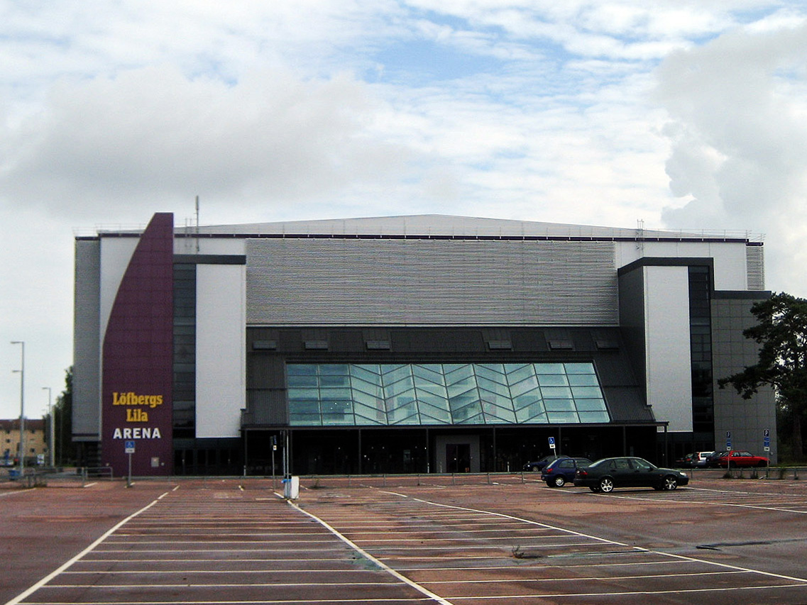 Löfbergs Lila Arena (since 2013 changed to Löfbergs Arena) in Karlstad, Sweden